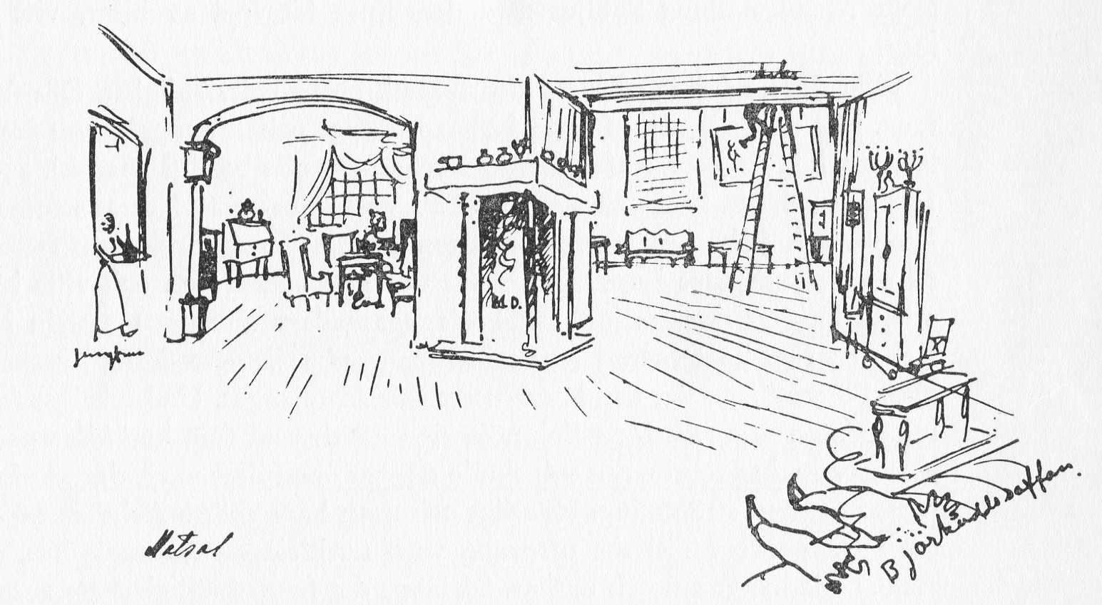 Interiörskiss av Villa Acke, Johan Axel Gustaf Acke